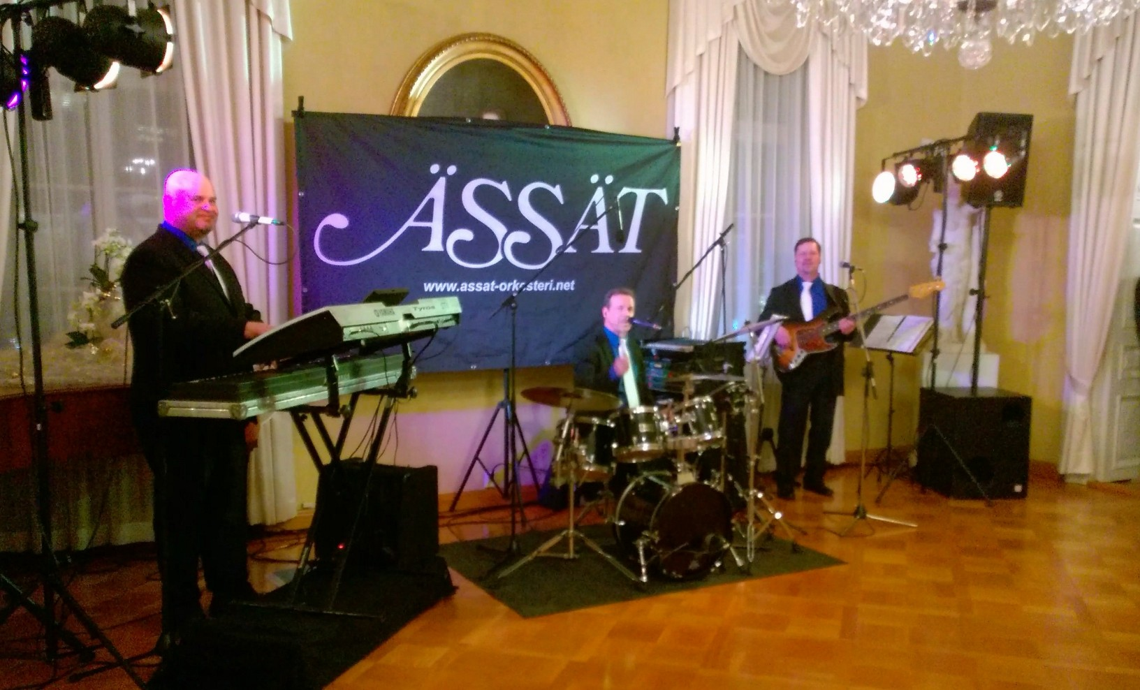 Kolme Ässää hoitaa homman